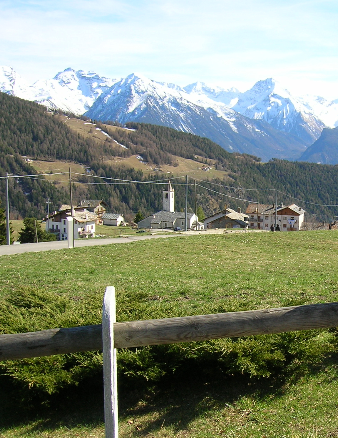 fraz. St._Barthelemy, comune di Nus, Valle d'Aosta, Italia.